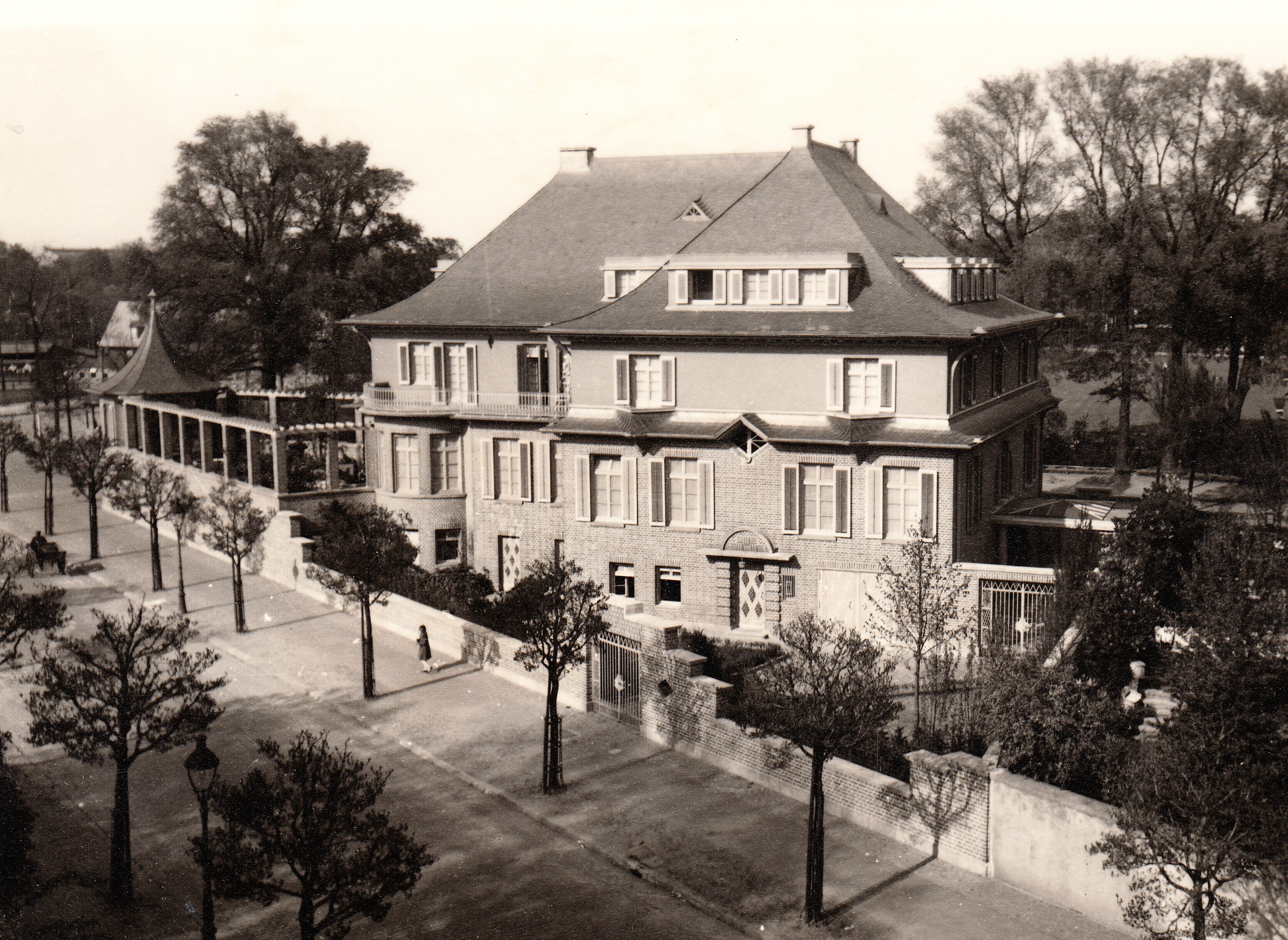 Villa Dr. Zapf, auf drei-eckigem Grundstück, Ansicht Oppenheim Straße